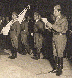 La Legion civica Argentina